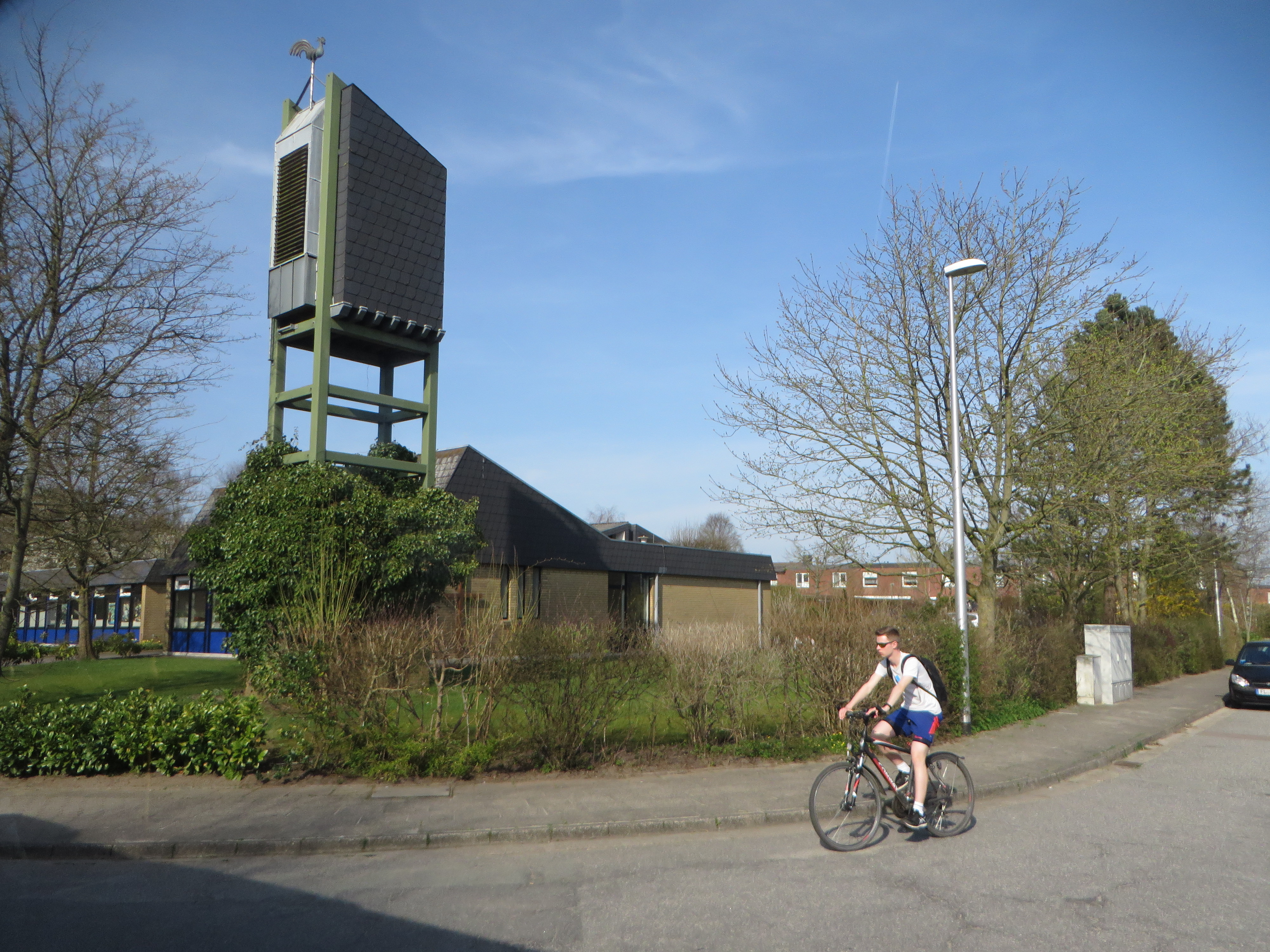 Gemeindezentrum Fruerlund (Flensburg 2018), Bild 009